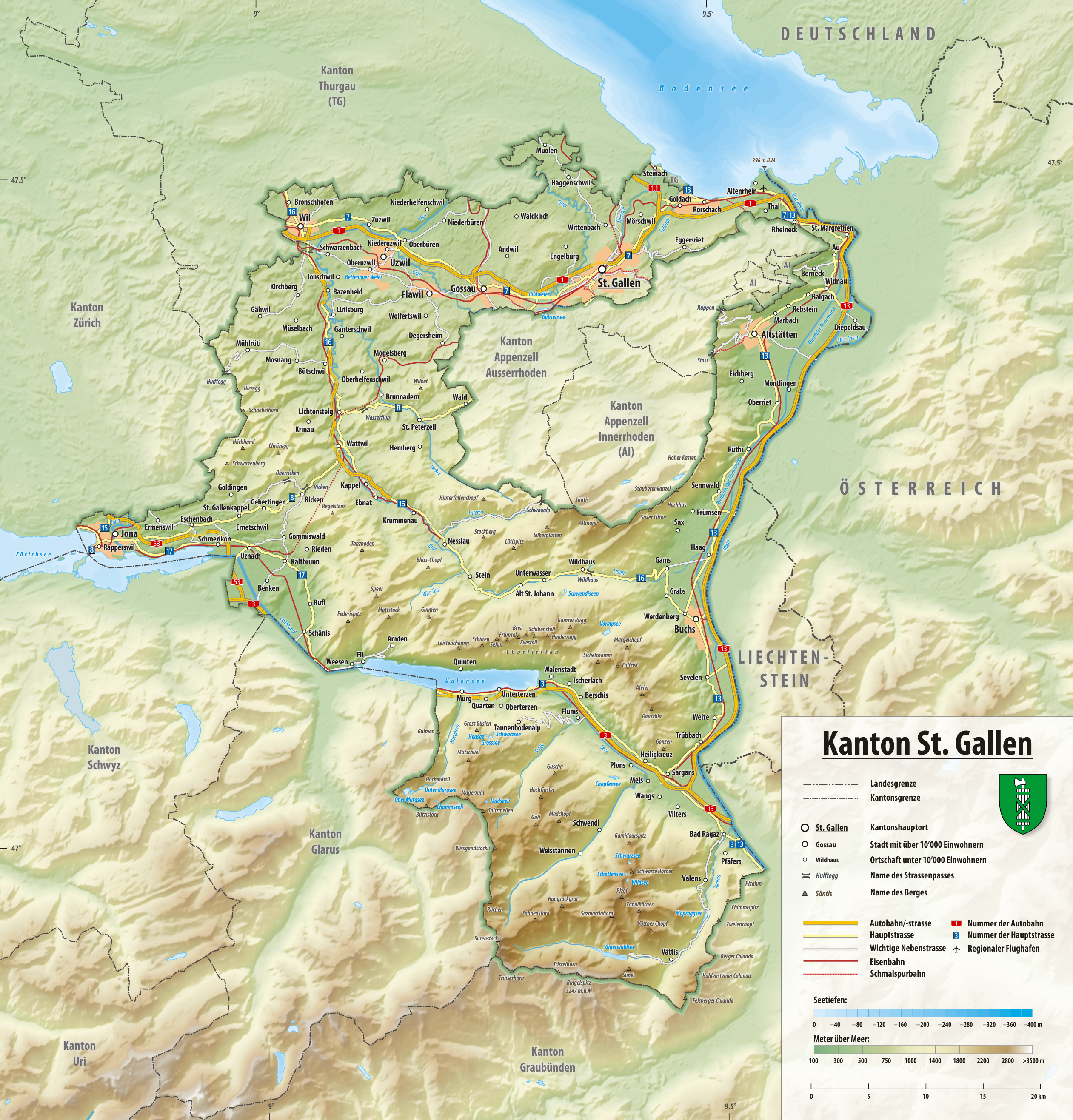 Reliefkarte des Kantons St. Gallen Topographischer Hintergrund: NASA Shuttle Radar Topography Mission (public domain). SRTM3 v.2.